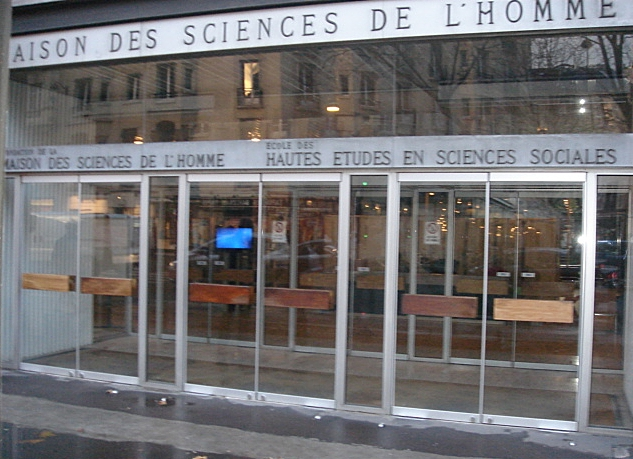 EHESS, maison des sciences de l'homme. Porte d'entrée principale.